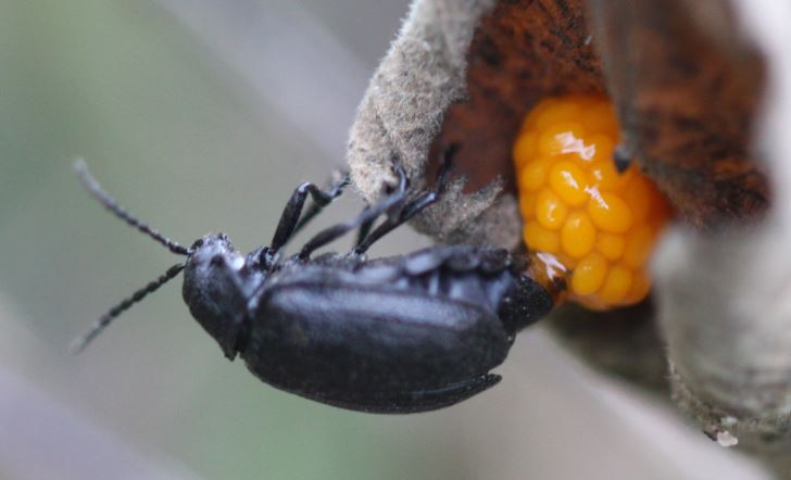 Rainfarn-Blattkäfer Galeruca tanaceti am 20. September 2018 bei der Eiablage